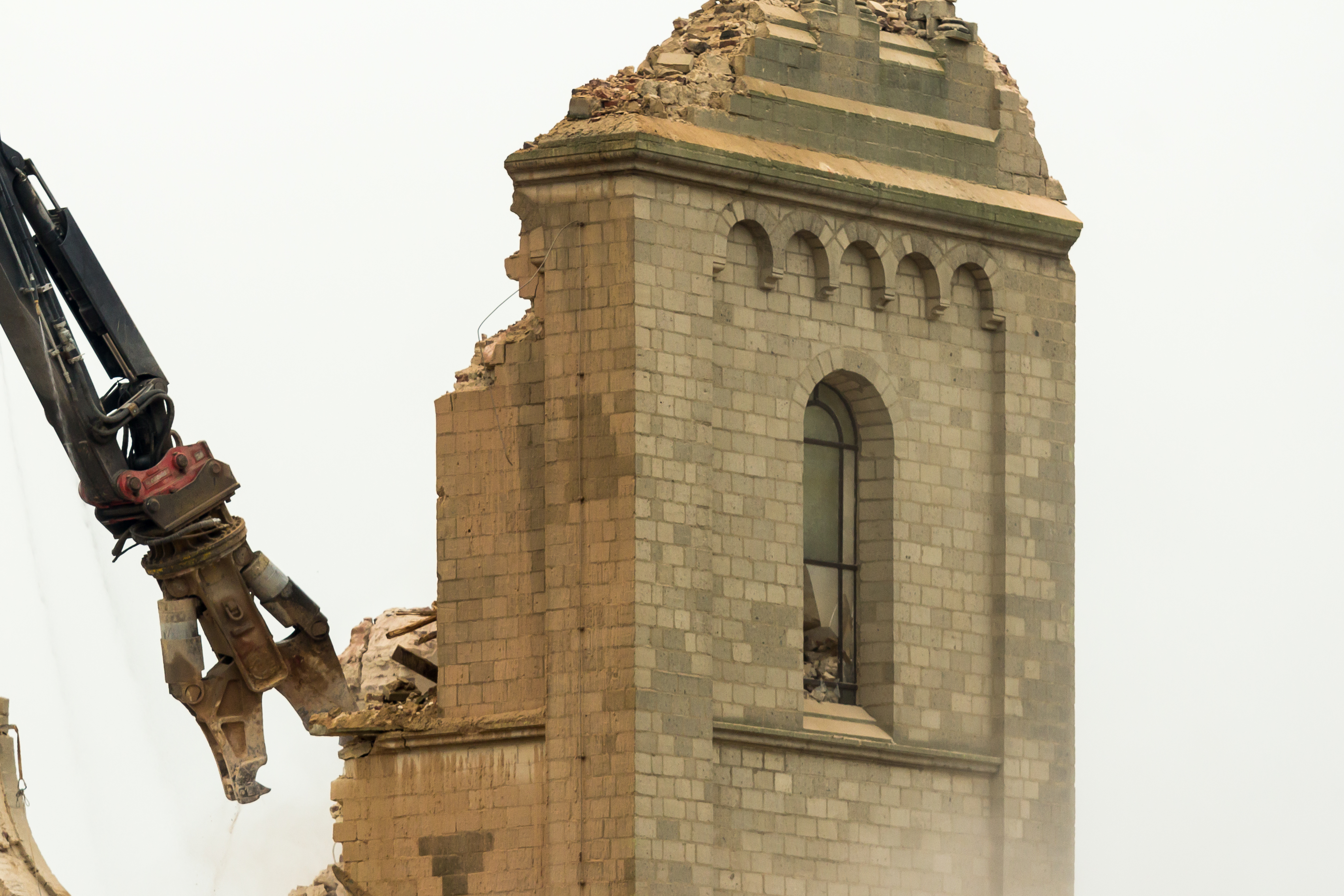 Abriss Immenrather Dom, St. Lambertus